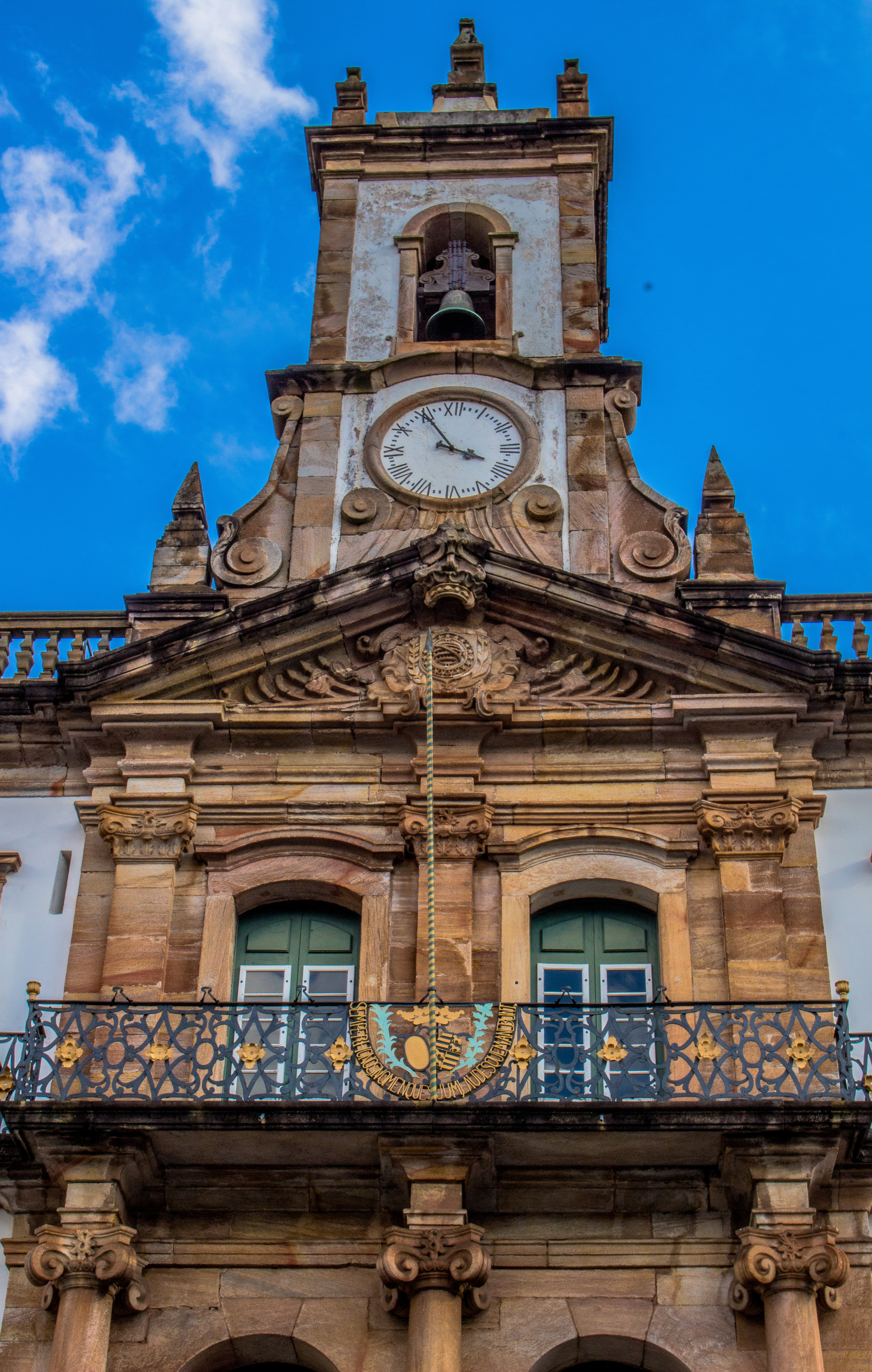 Palácio dos Governadores ou Casa à Praça Tiradentes